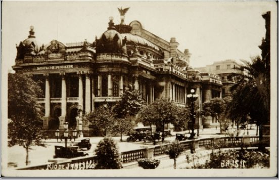 (portuguese) Teatro Municipal do Rio de Janeiro, foto tomada entre 1905 e 1909, pertencente ao acervo da Fundação Joaquim Nabuco e catalogado como de Domínio Público em site do Governo do Brasil